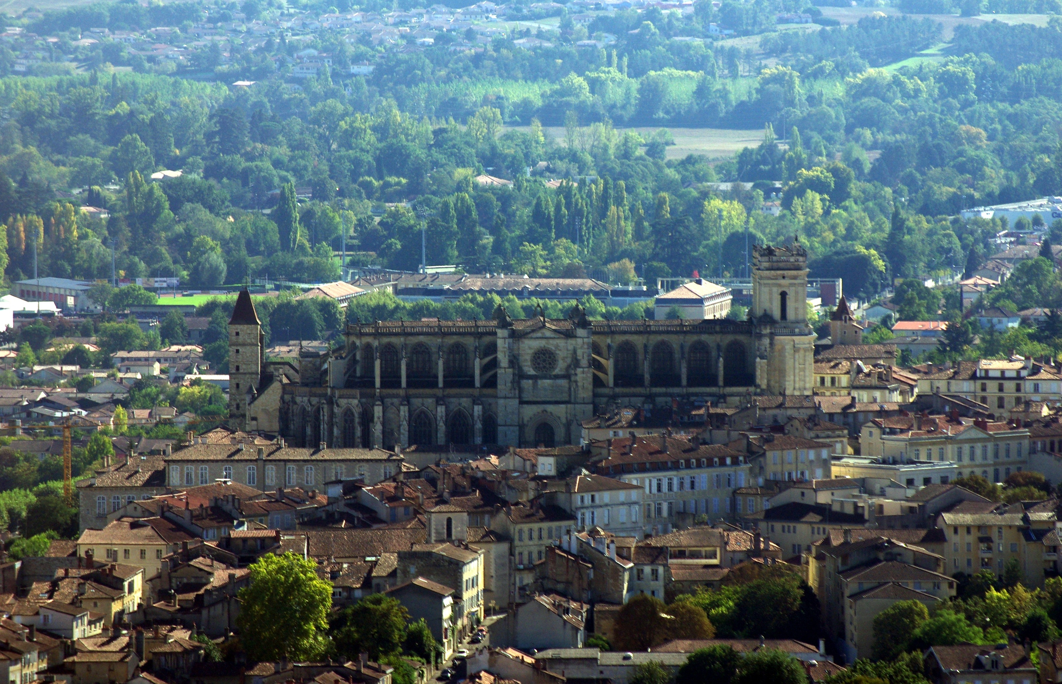 Vue aérienne de la cathédrale Sainte-Marie d'Auch et de la tour d'Armagnac.